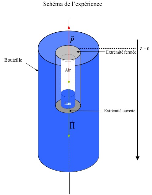 Schéma simplifié du Ludion avec les forces en présence.